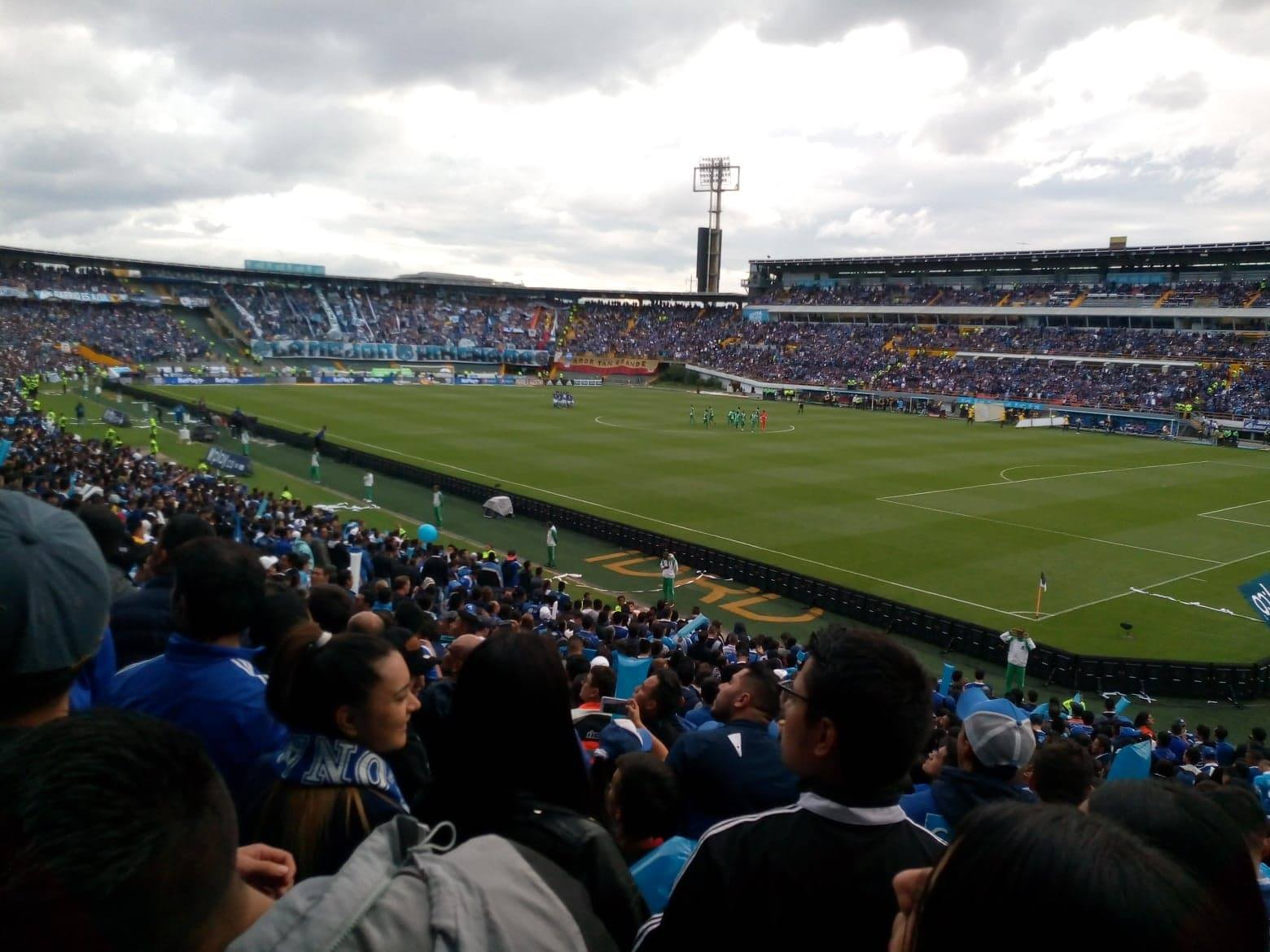 Hinchada de Millonarios colmando el campin en el partido Millonarios-Nacional el 9 de marzo de 2019.